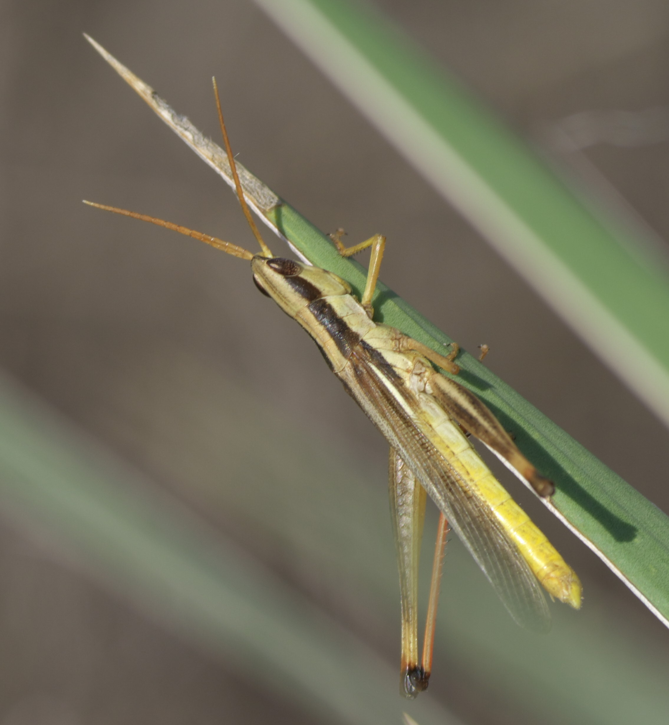 Mermiria bivittata, Two-striped Mermiria, ID Confidence: 90